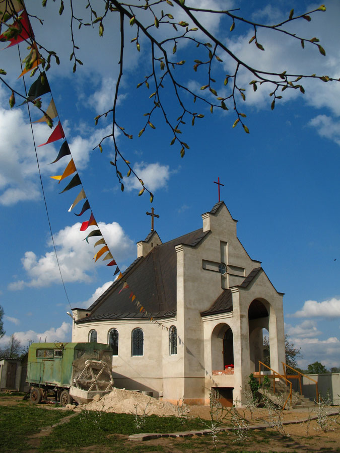 Беларуская (тарашкевіца): Касьцёл Сьв. Валянтына ў Смалявічах